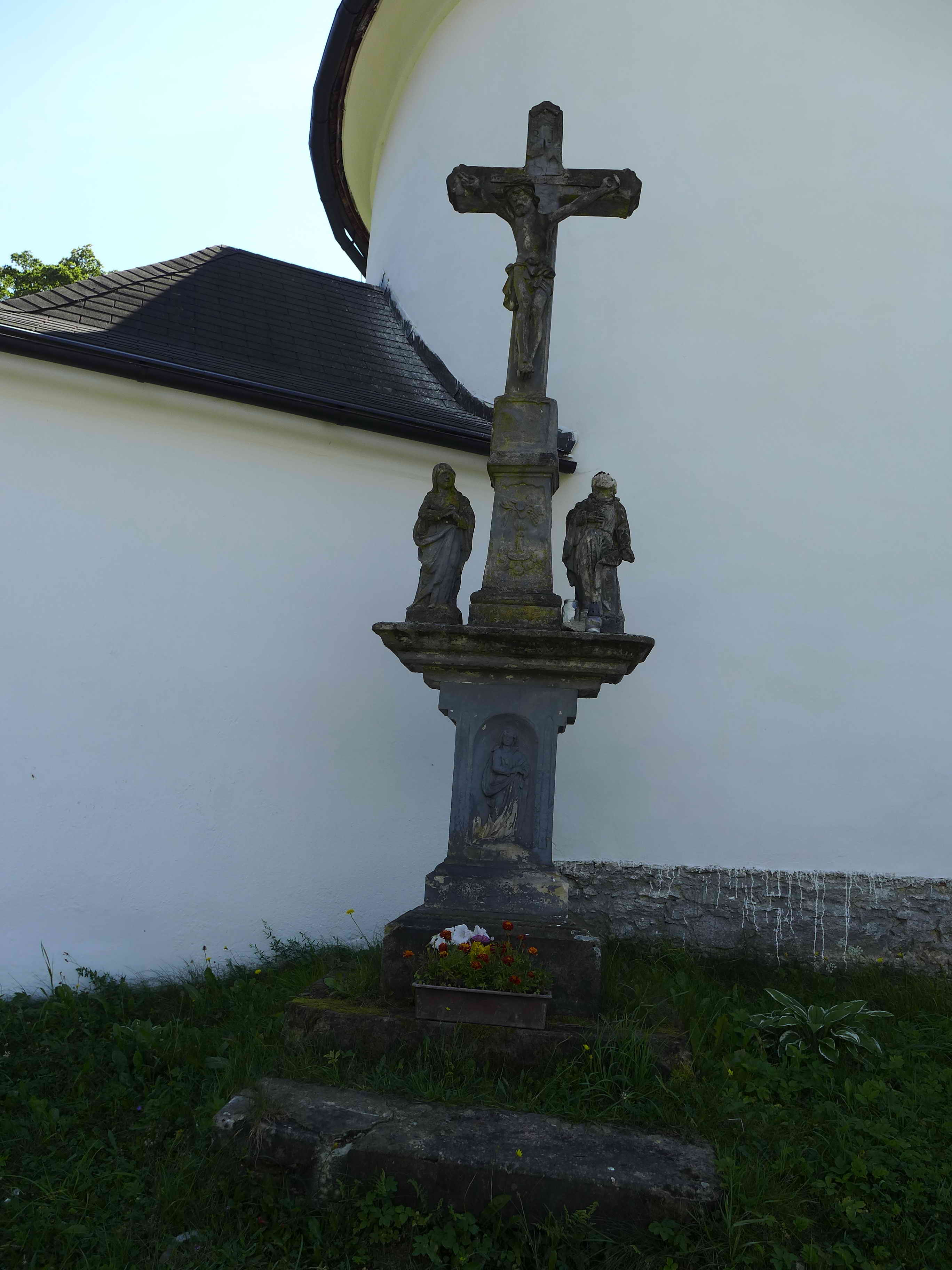 Kostel svatého Isidora, Nové Losiny 30, nad obcí nad silnicí do Přemyslova, Nové Losiny.